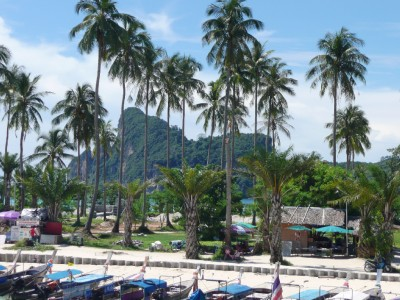 Koh Phi Phi Island